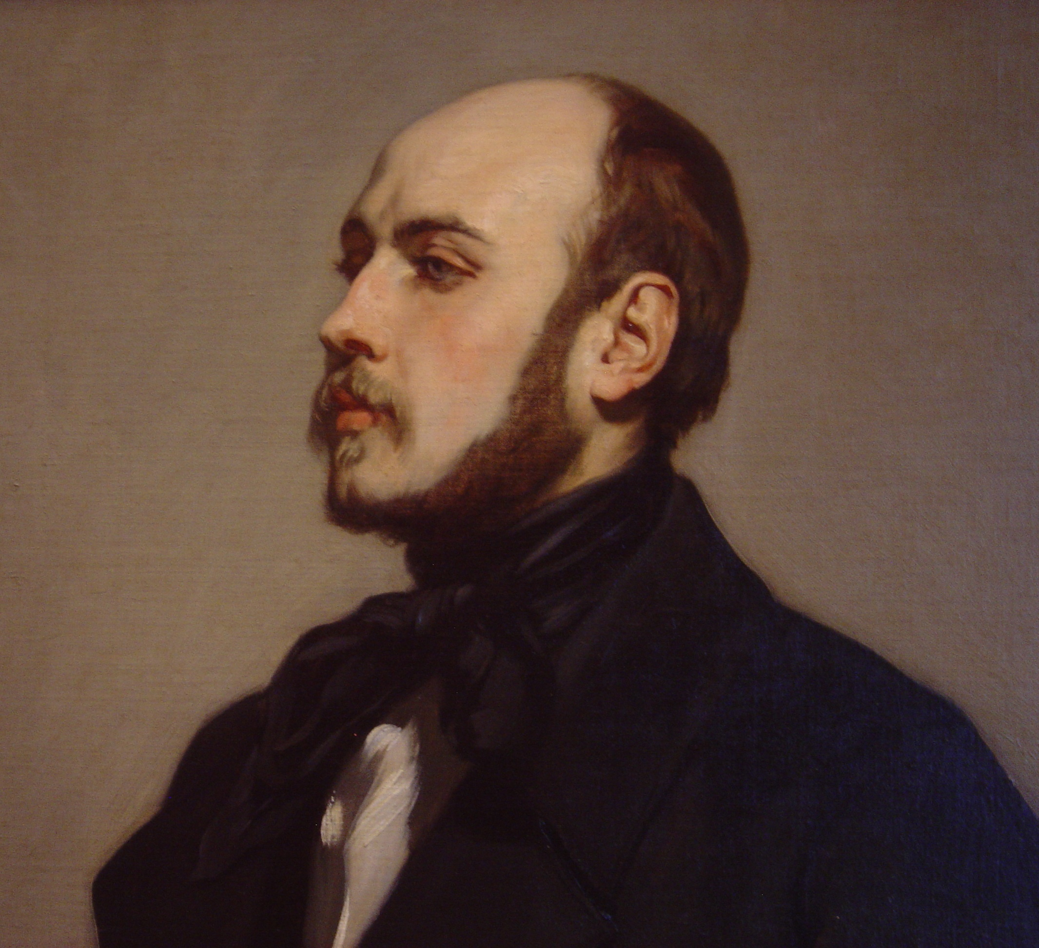 Thomas Couture, Portrait de M. [Léon] Ohnet, huile sur toile. Tableau exposé au Salon de 1841. Donné en 1920 à la ville de Paris par Lucien Morane, gendre de Georges Ohnet (fils de Léon).